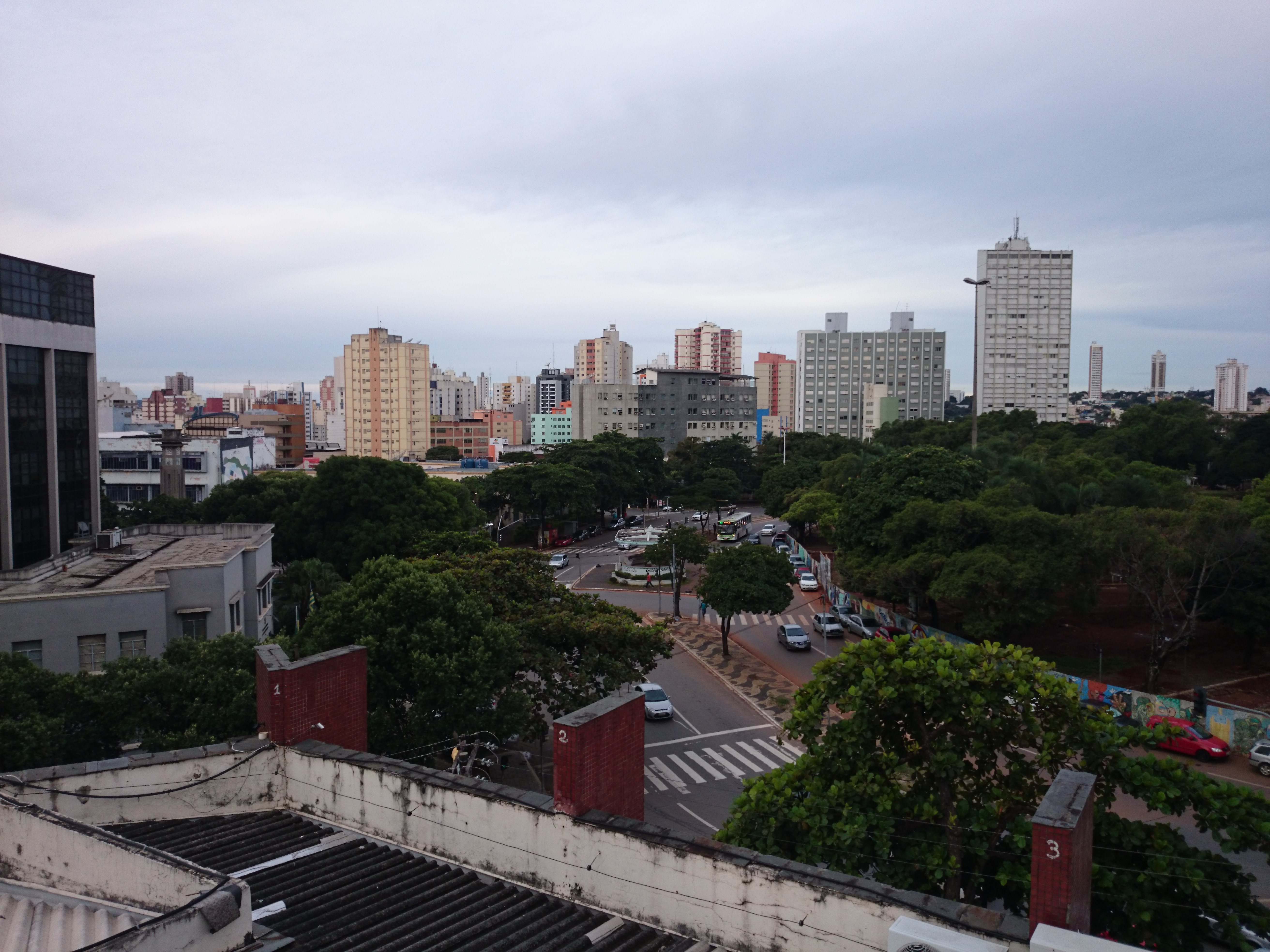 Vista da Praça Cívica no Centro de Goiânia, 11 de maio de 2015.